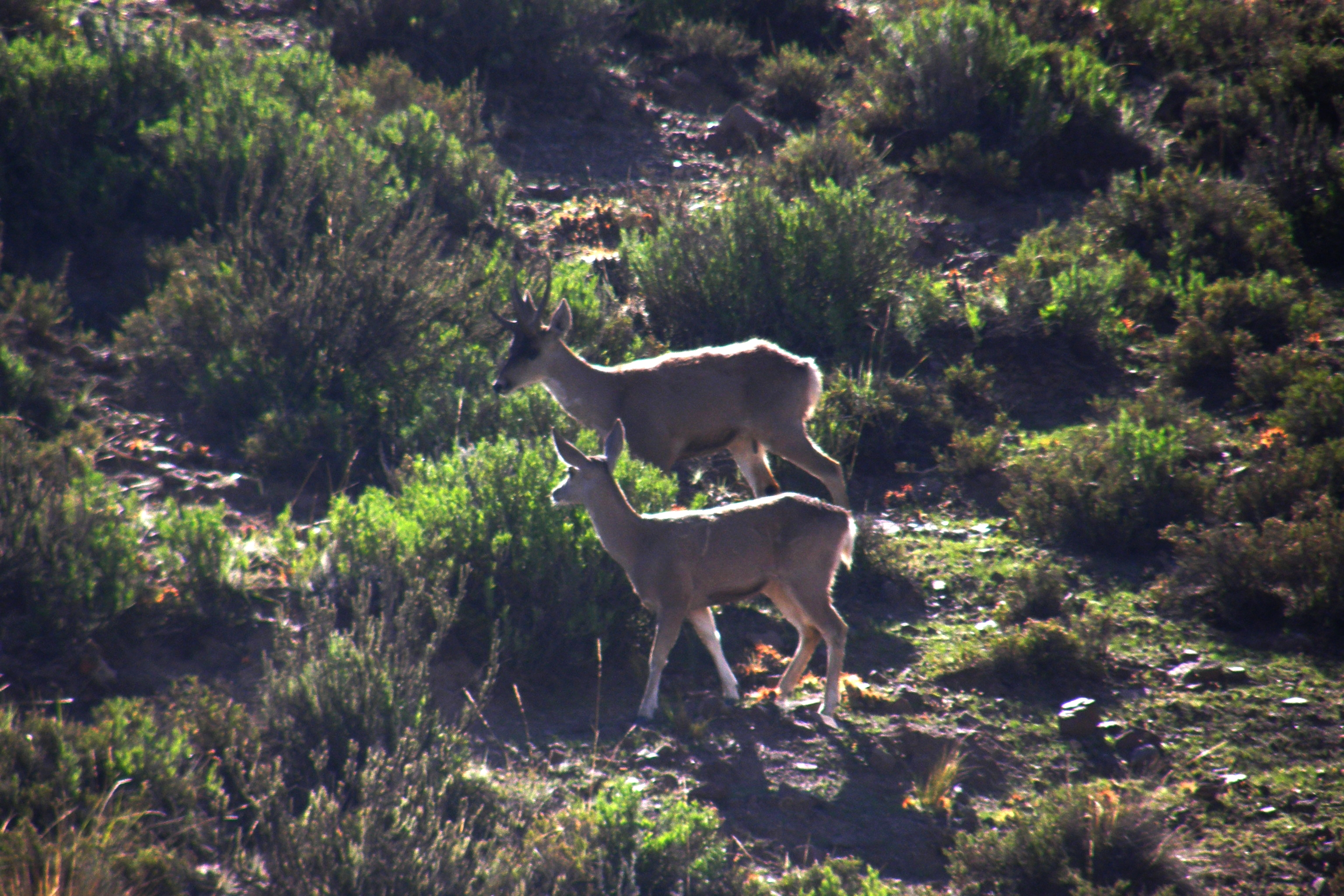 Huemul du nord ou Taruca (Hippocamelus bisulcus). Deux individus à côte de la ville de Putre (Chili)